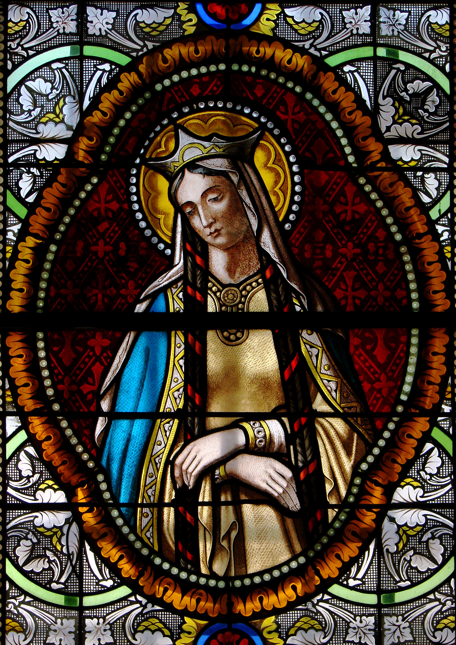 Vitrail néogothique dans l'église Saint-Martin de Florac; Sainte Clothilde.